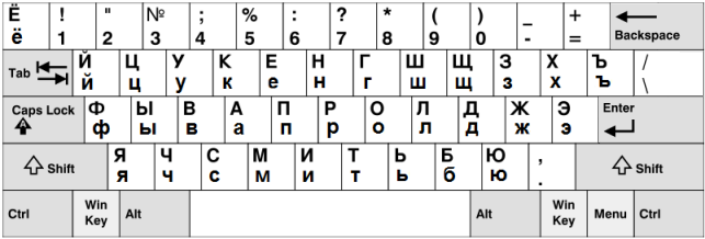 Windowsのロシア語キーボード